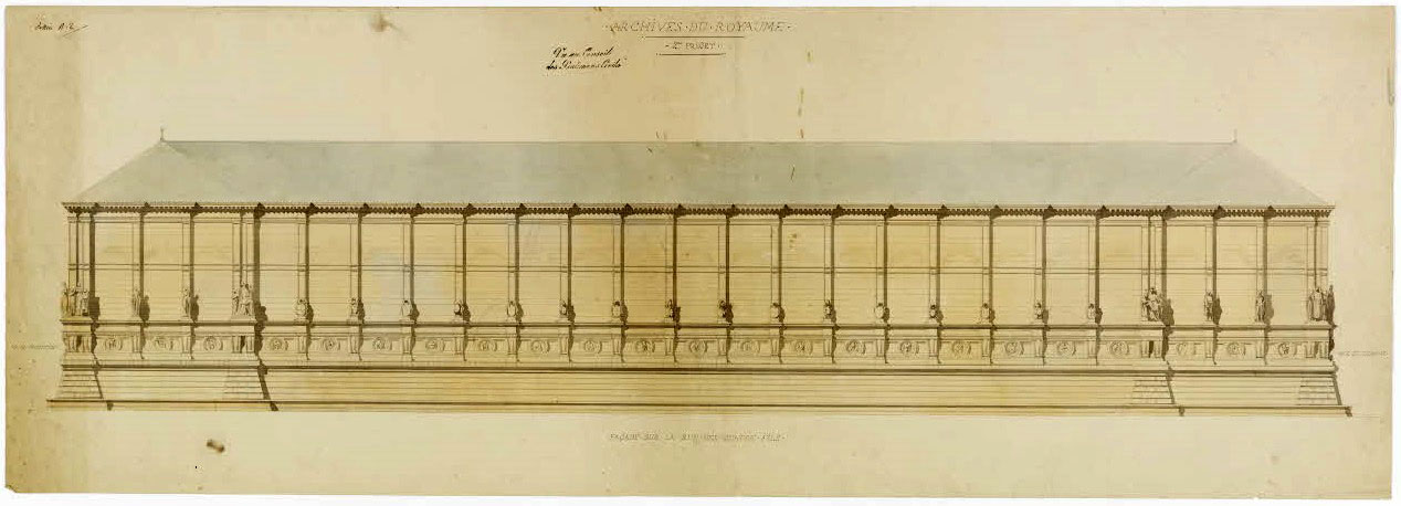 Projet n°2 de Charles Lelong. Elévation sur la rue des Quatre-Fils (Grands dépôts).